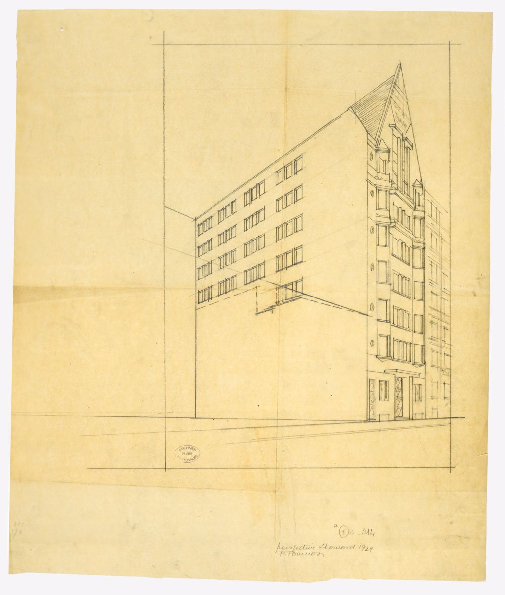 Élévation de la façade sur rue, par Paul Tournon, Archives nationales (Fontainebleau), 377 AP 236 1-15-14